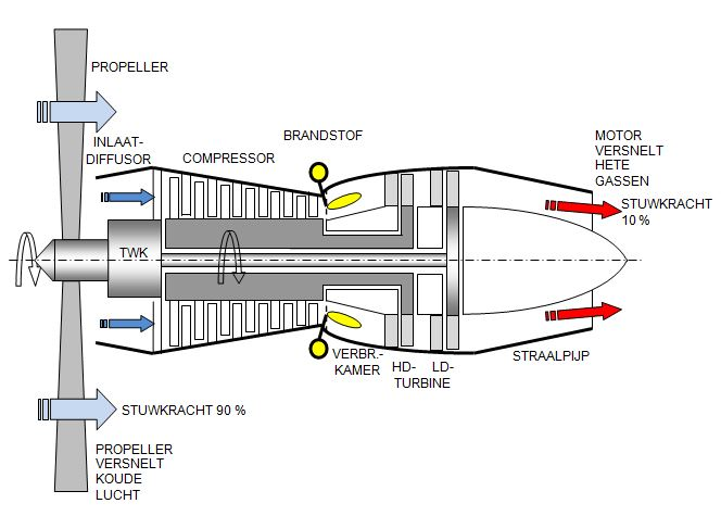 Principe van een turboprop motor